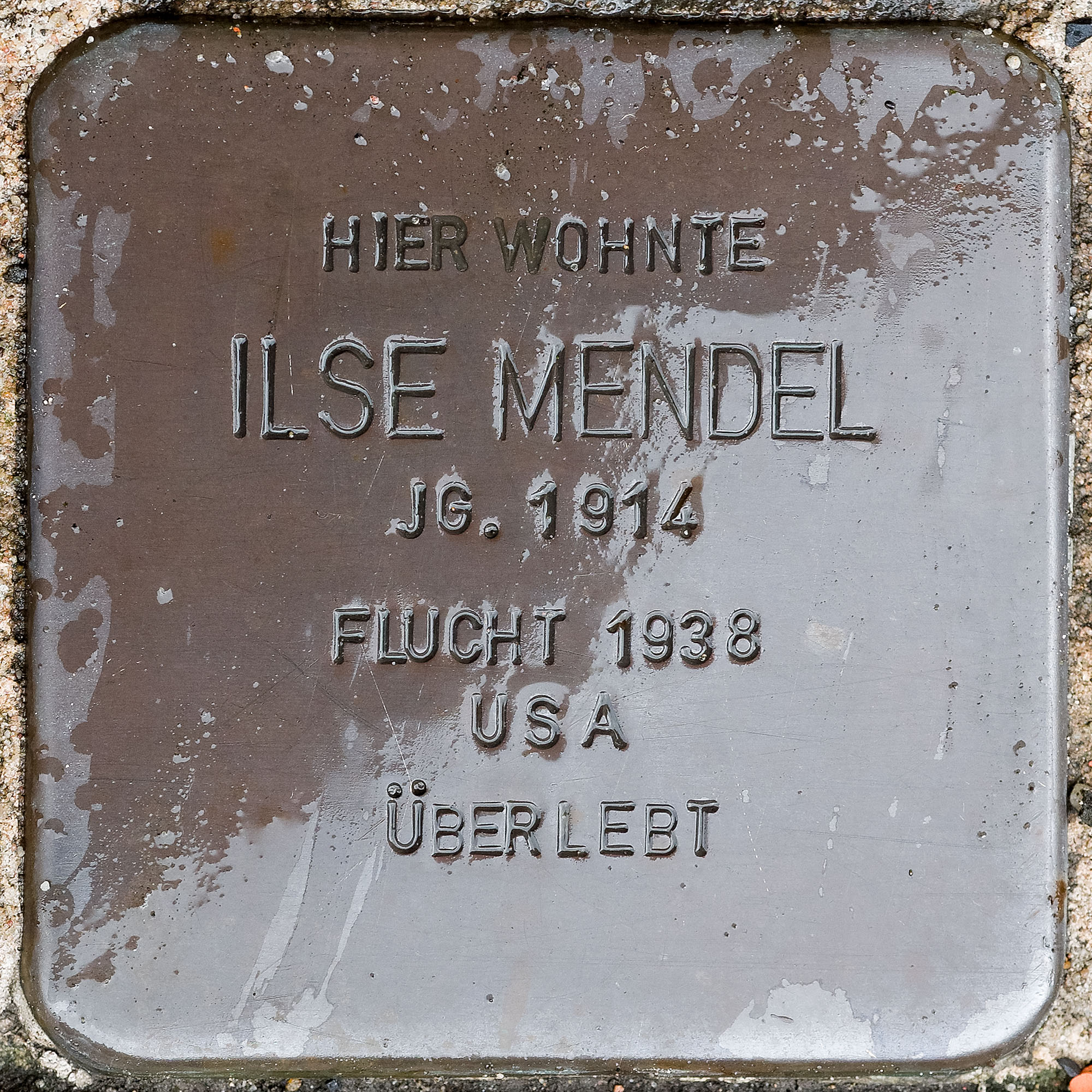 Stolpersteine Straelen: Mendel, Ilse